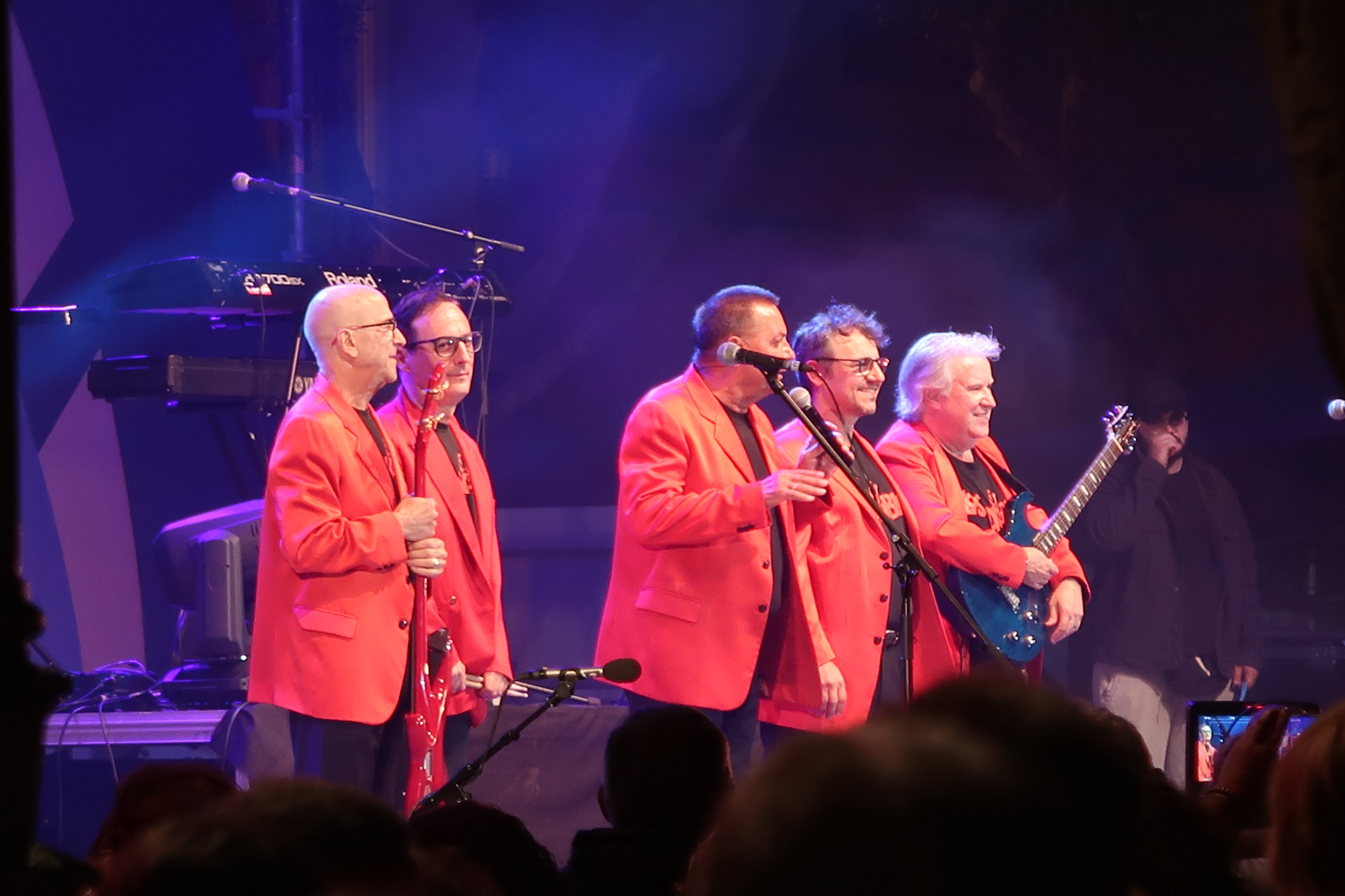 Los Diablos en concierto 2019